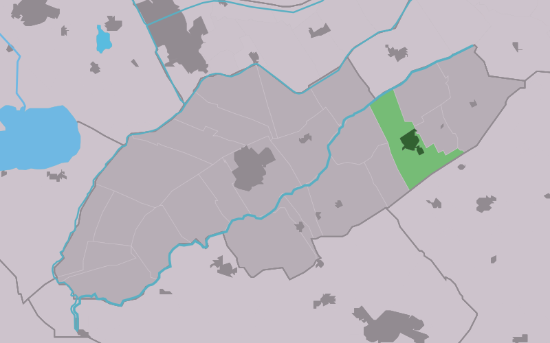 Kaartsje fan himrik fan Noardwâlde